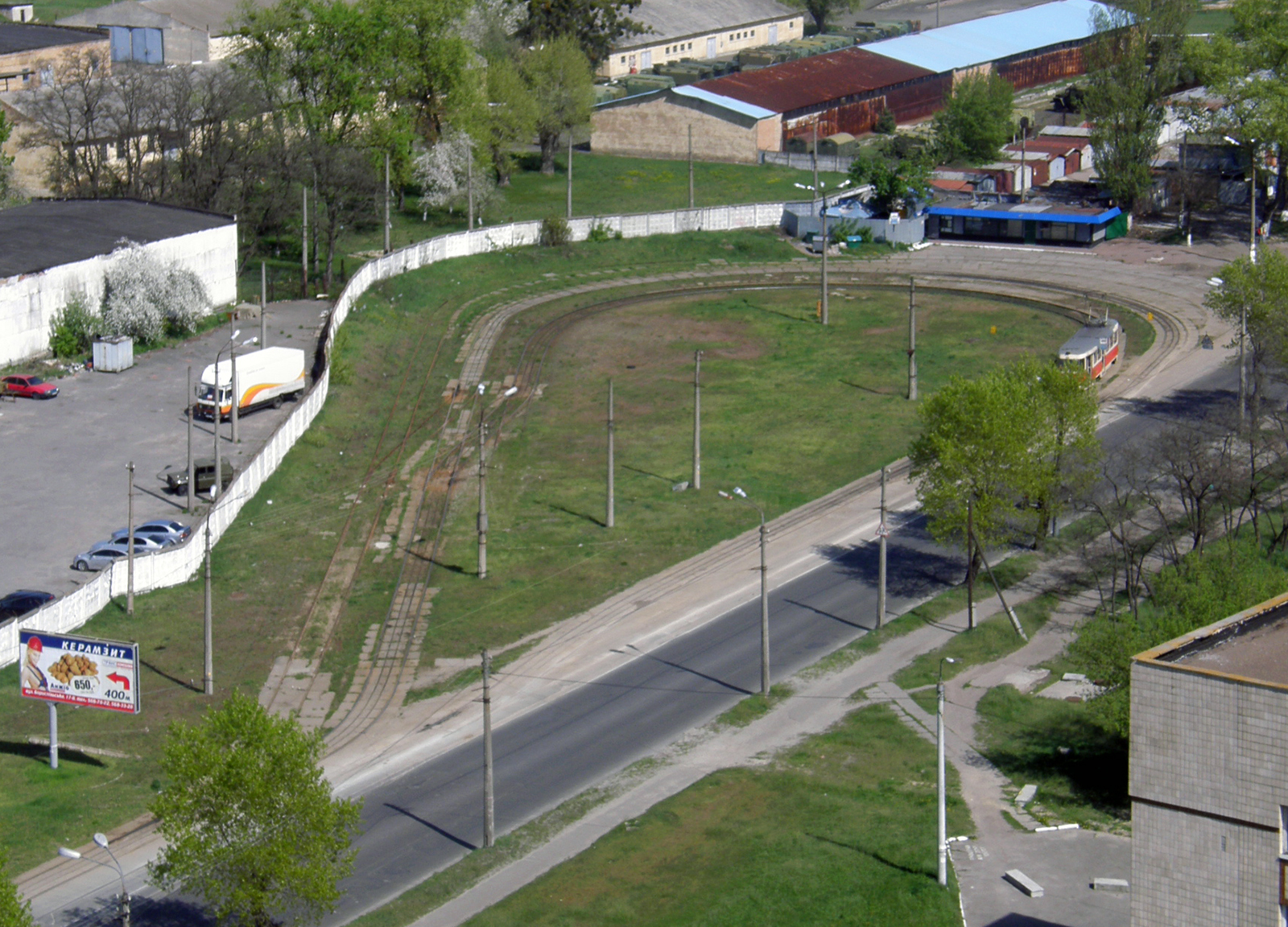 трамвайное кольцо ЗЖБК